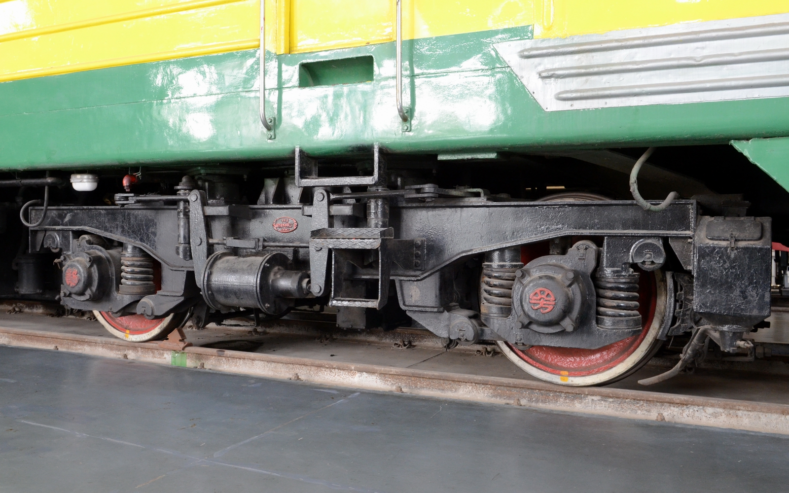 东方红1型机车的二轴转向架